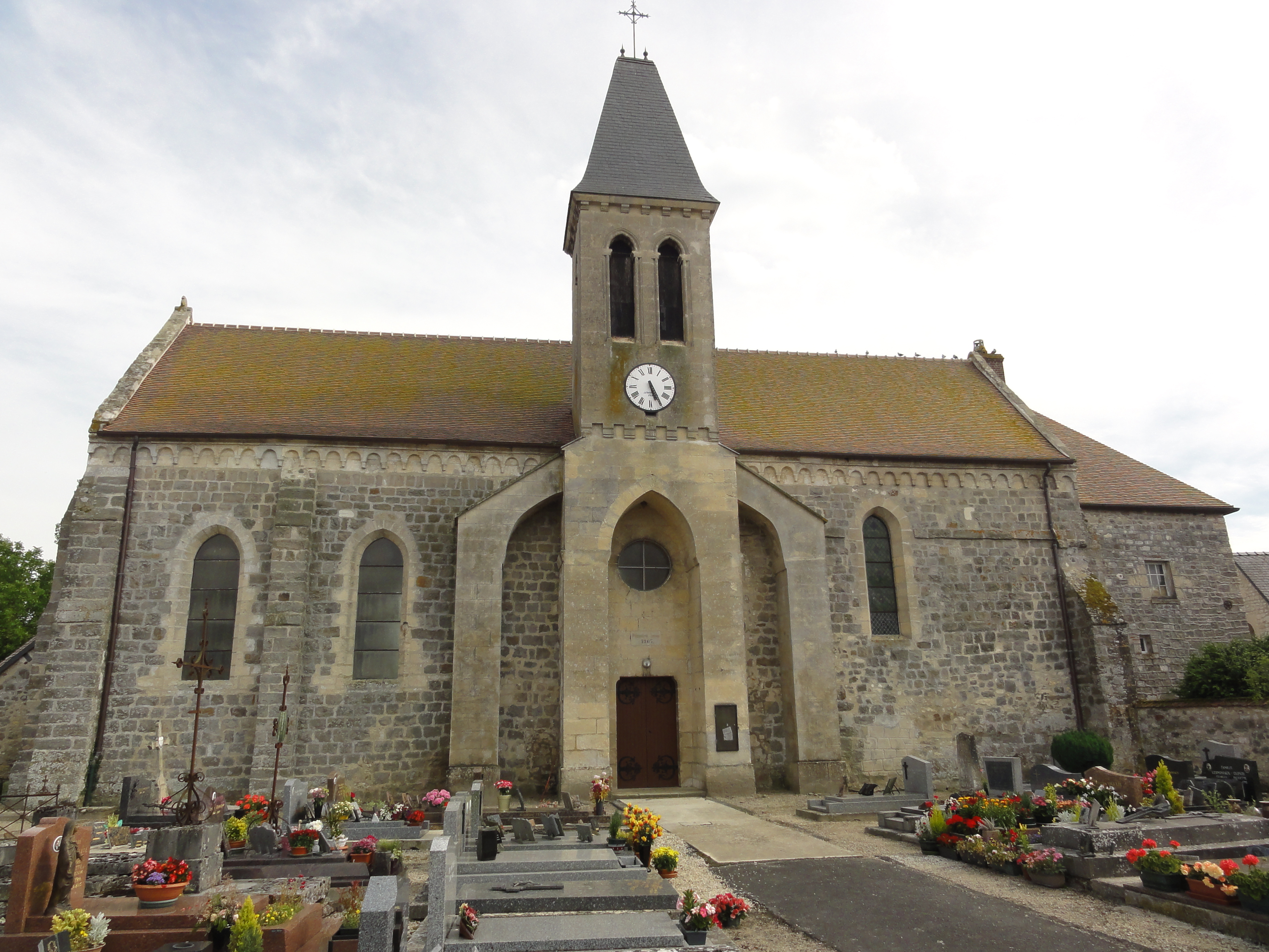 Samoussy (Aisne) église